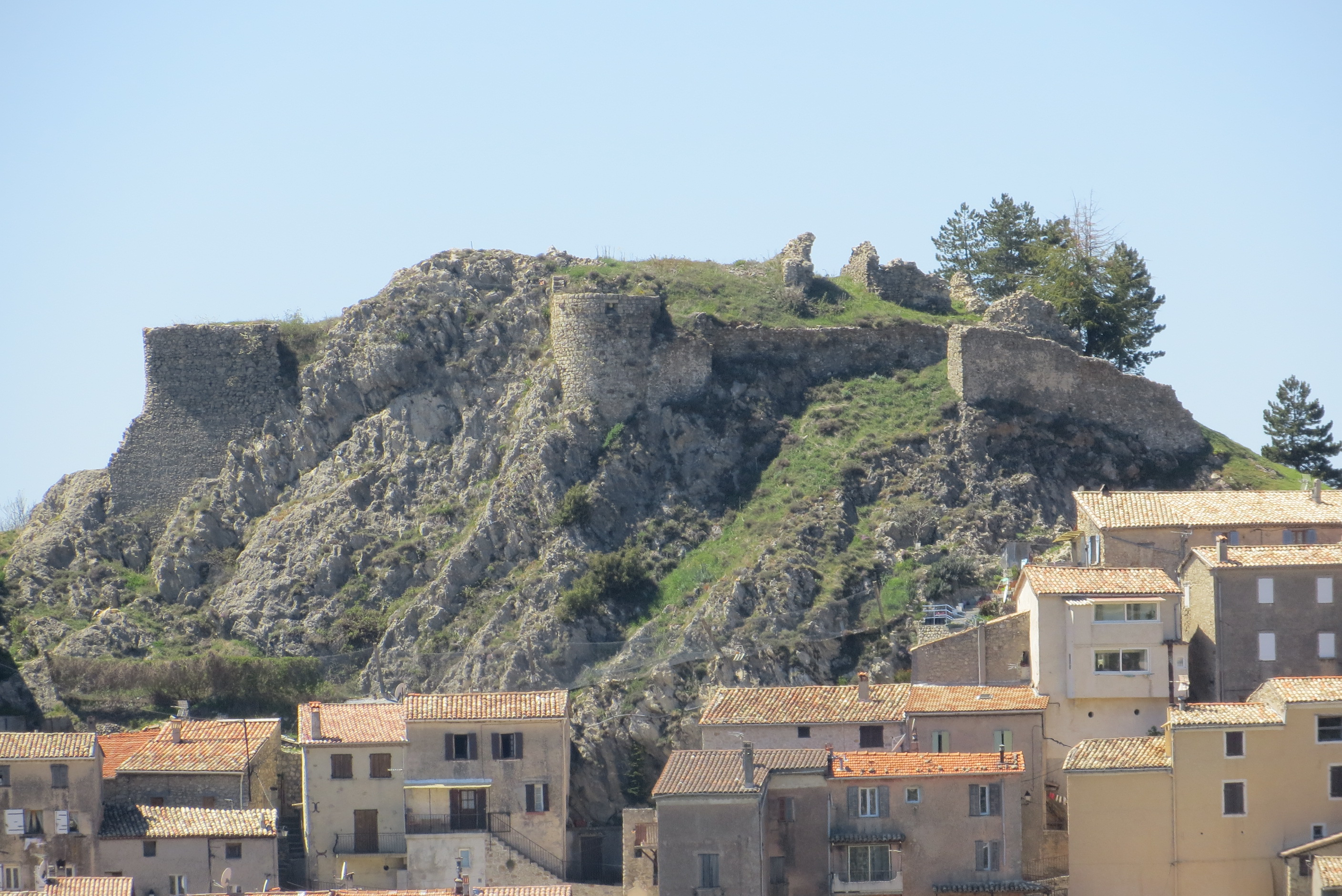 Village d'Ascros (Alpes-Maritimes) : ruines du château médiéval